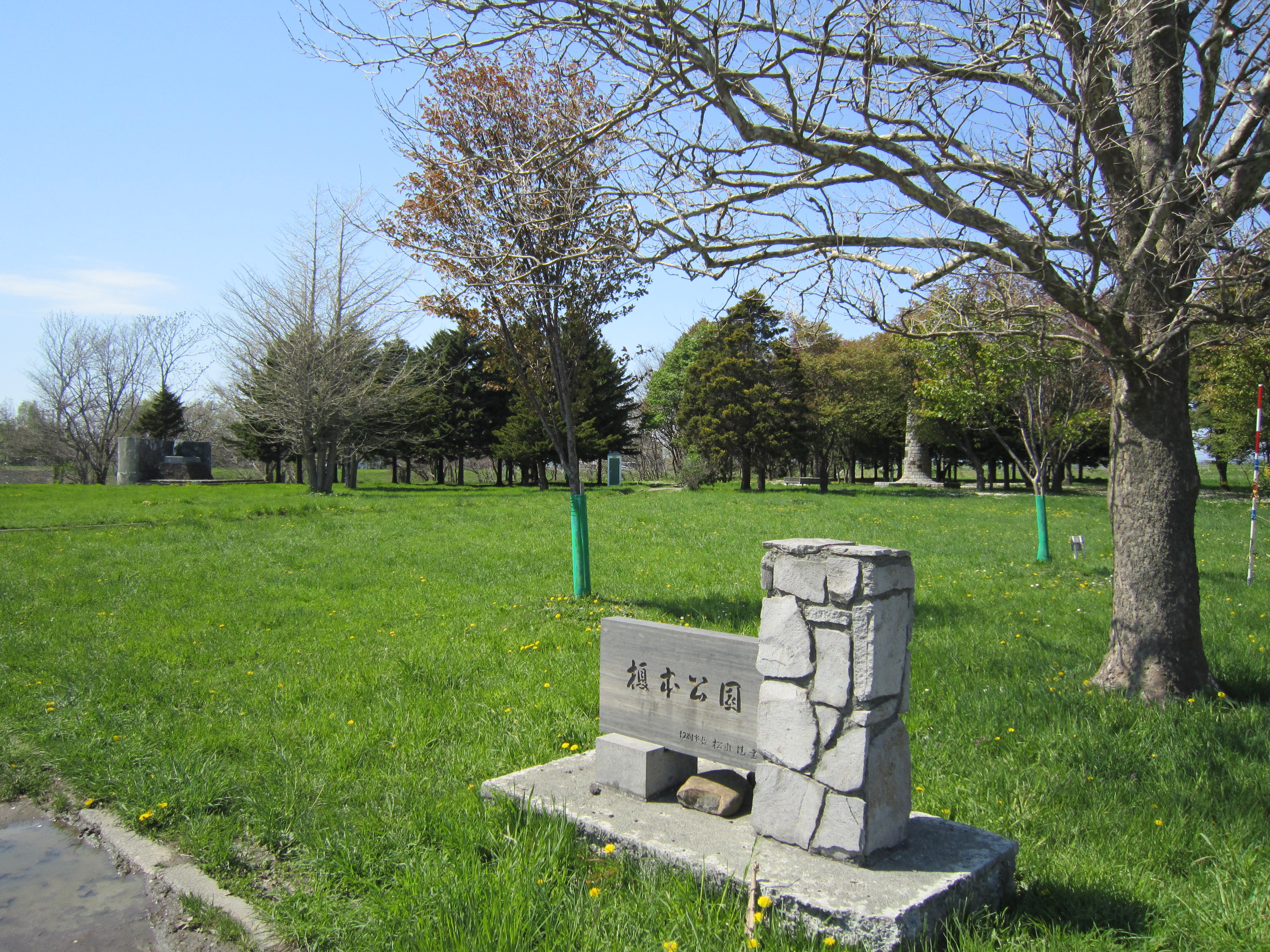 榎本公園。江別市